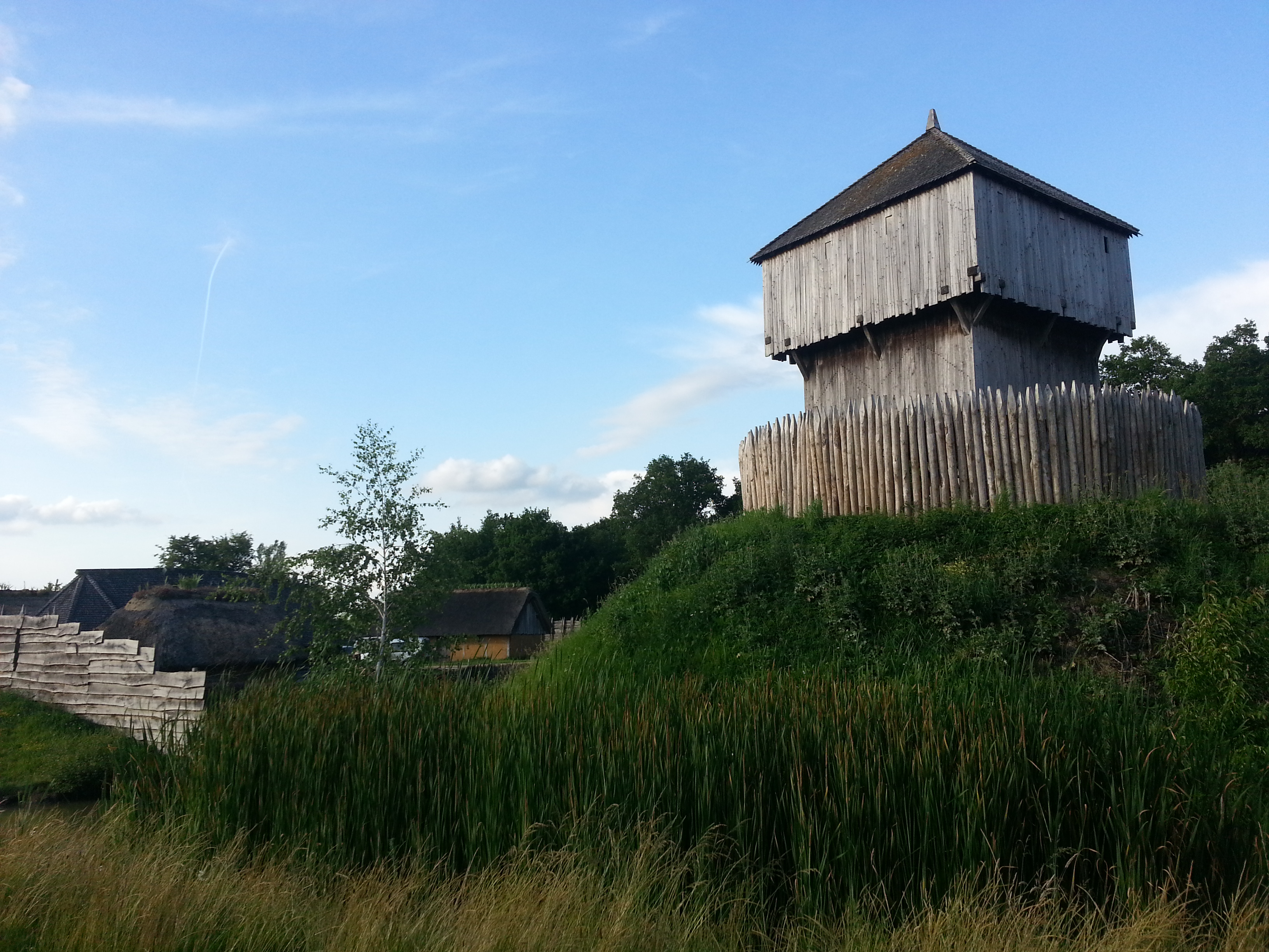 Donjon, vu de l'extérieur de l'enceinte.